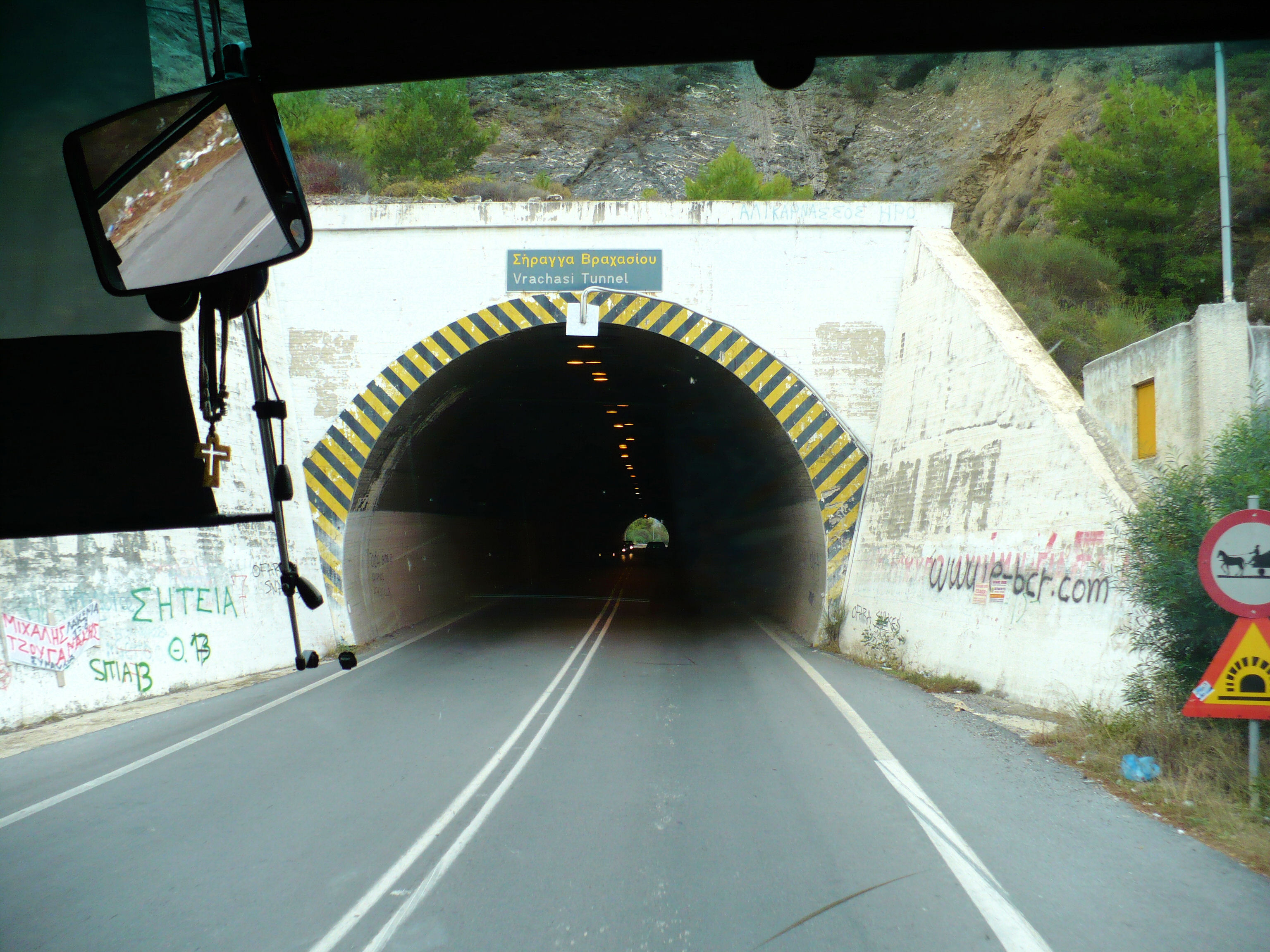 tunel na drodze E75 do Heraklionu